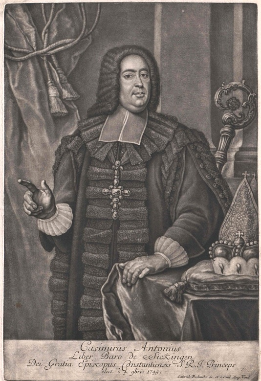 Kasimir Anton von Sickingen, Bischof von Konstanz (1684-1750)